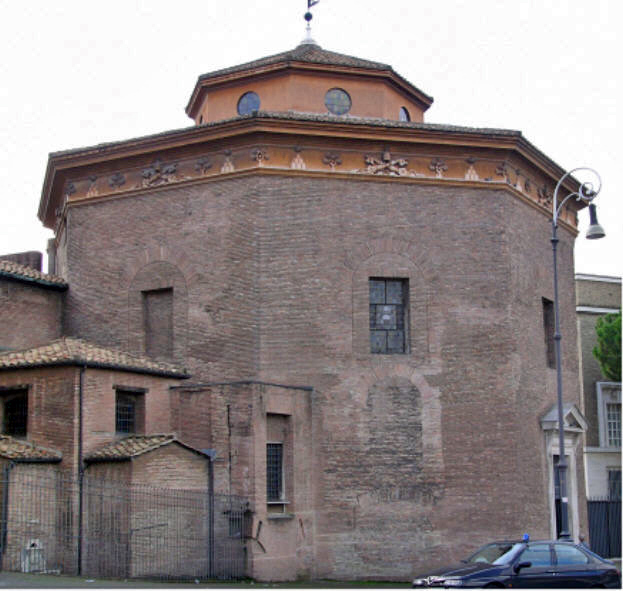 Baptisterium des Laterans in Rom.